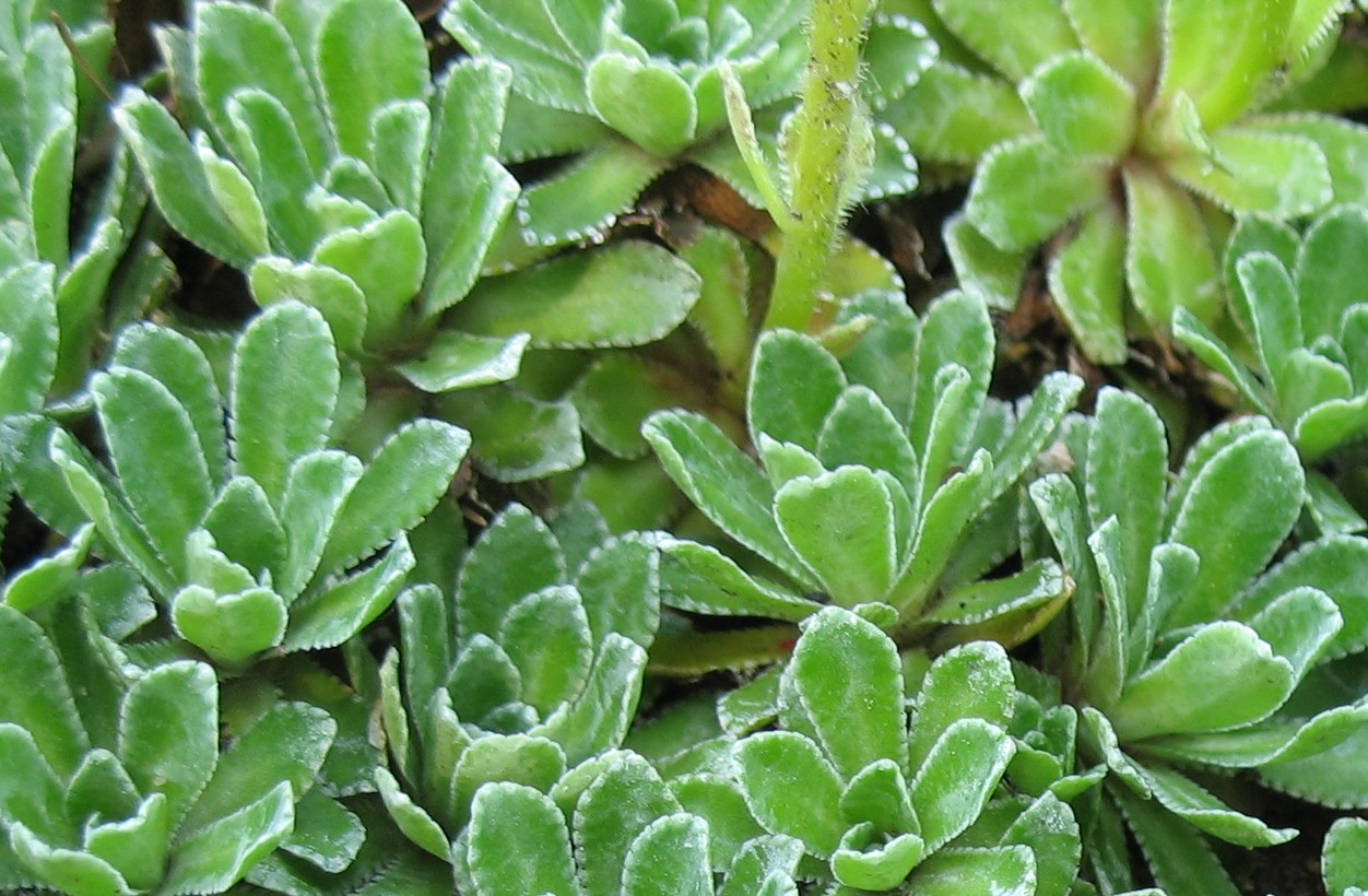 Skalnica gronkowa (Saxifraga paniculata), zdjęcie wykonane 25.06.2006 w Miejskim Ogrodzie Botanicznym w Zabrzu